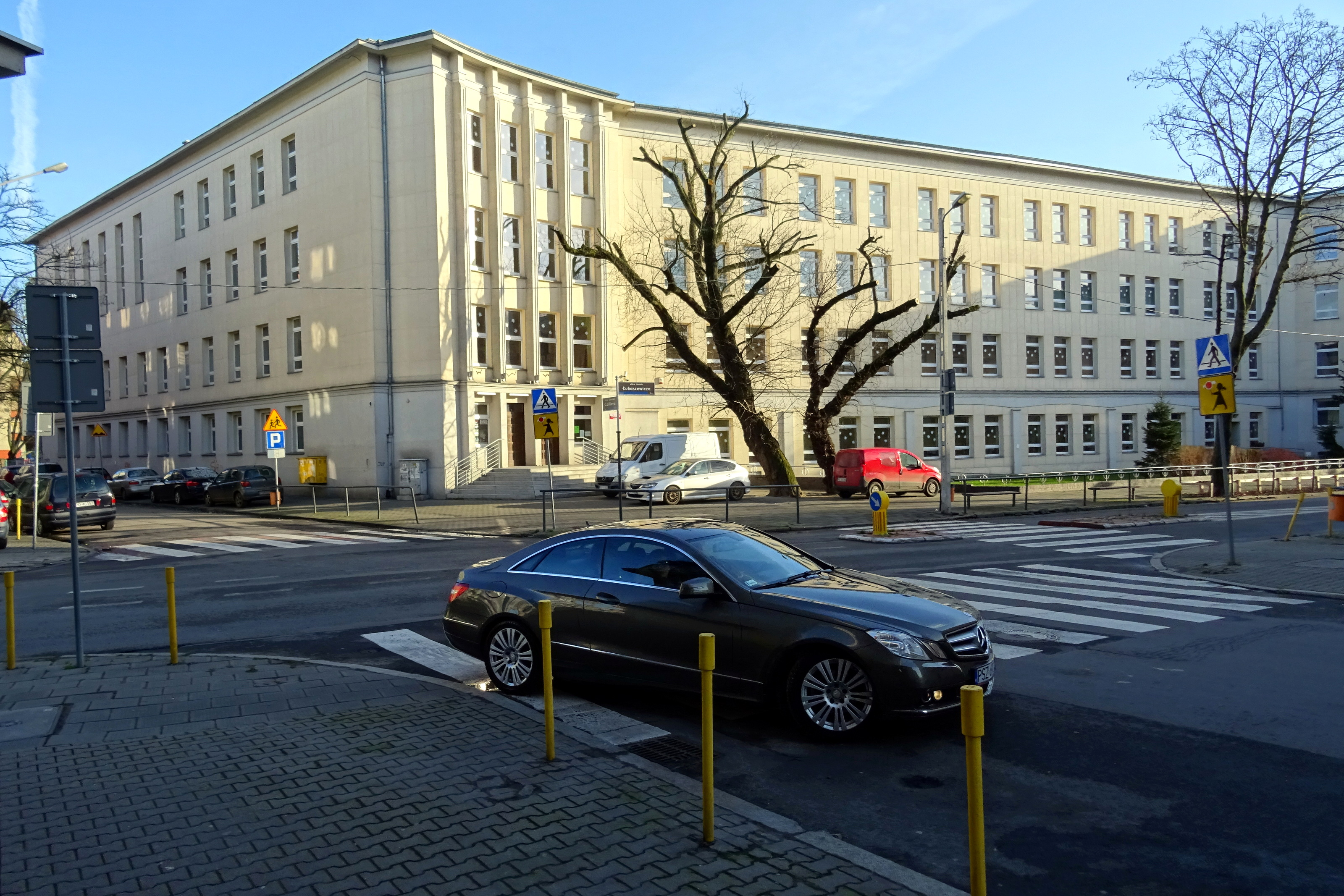 Szkoła przy ul. Łukaszewicza 9/13 (Szkoła Podstawowa nr 9 im. doktora Franciszka Witaszka) w Poznaniu. Wybudowana w latach 1955-1958 w stylu socrealistycznym. W 1995 - zabudowa podcieni, w 2010 - remont z dociepleniem